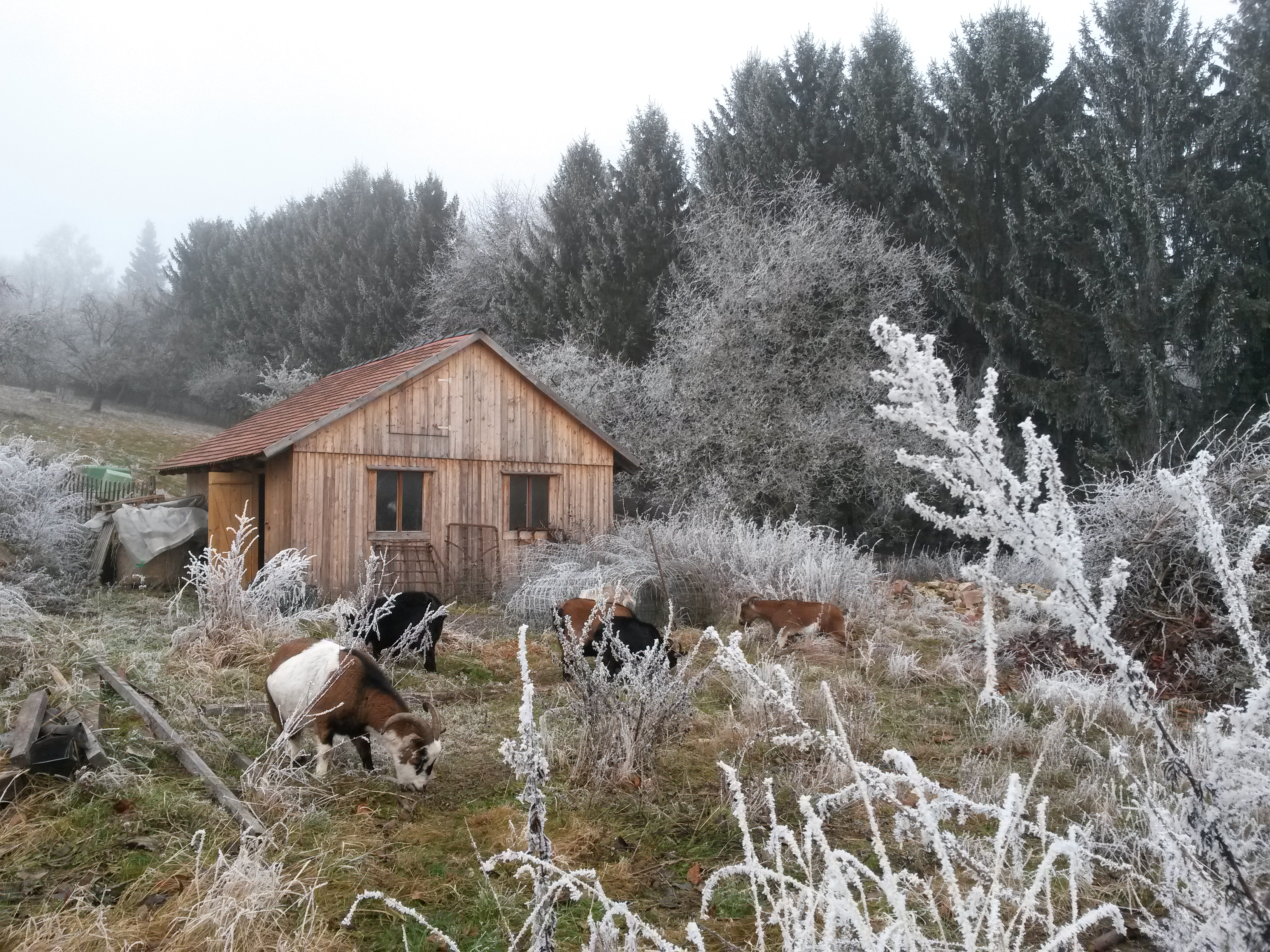 Robert Rädel, Restaurant oben, Heidelberg, Kohlhof